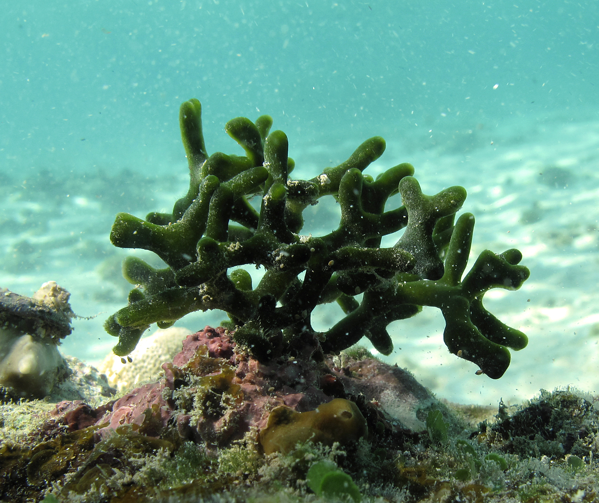 Une algue Codium sp. à la Réunion.